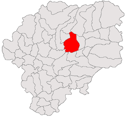 Categorie:Hărţi ale judeţului Bistriţa-Năsăud